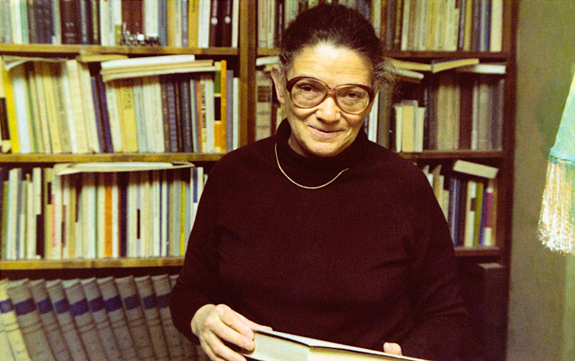 Наталья Юльевна Шведова (1916-2009) - лингвист, лексикограф, автор работ о лексической семантике, морфологии, синтаксисе современного русского языка, исследователь разговорной речи.